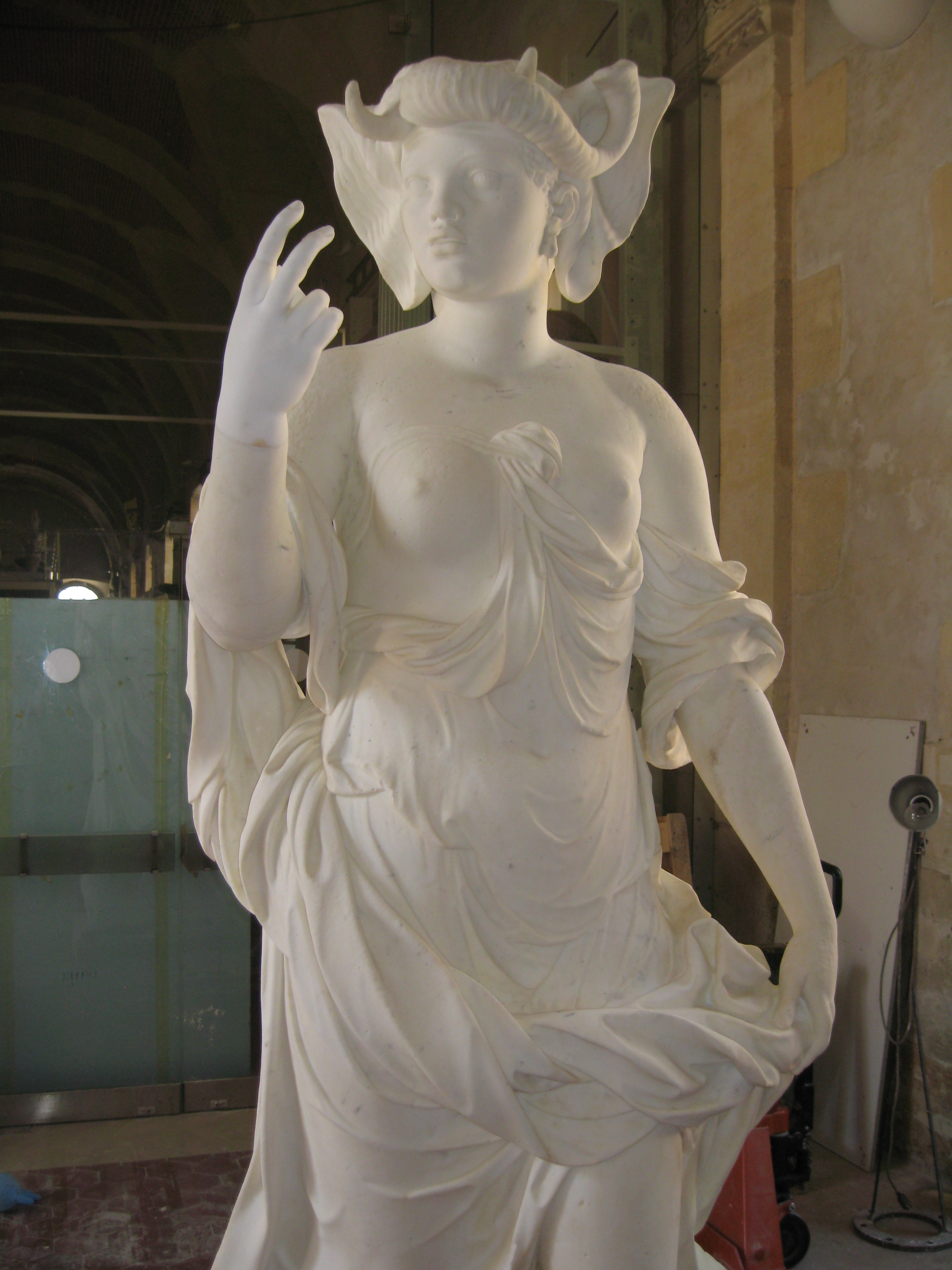 L'Afrique, de Georges Sibrayque et Jean Cornu Unknown